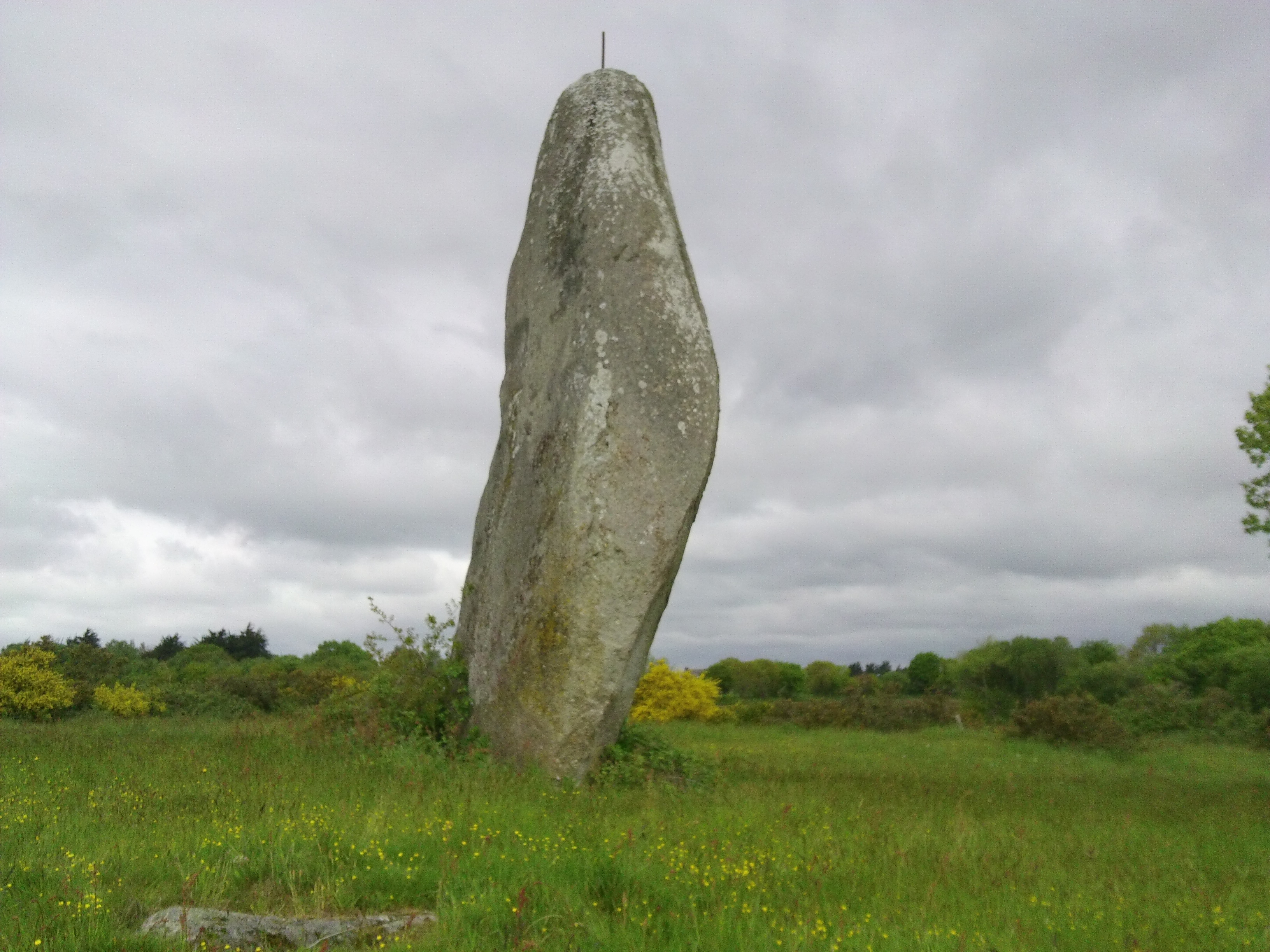 menhir au lieu dit Min-hir, près de Bégard. .